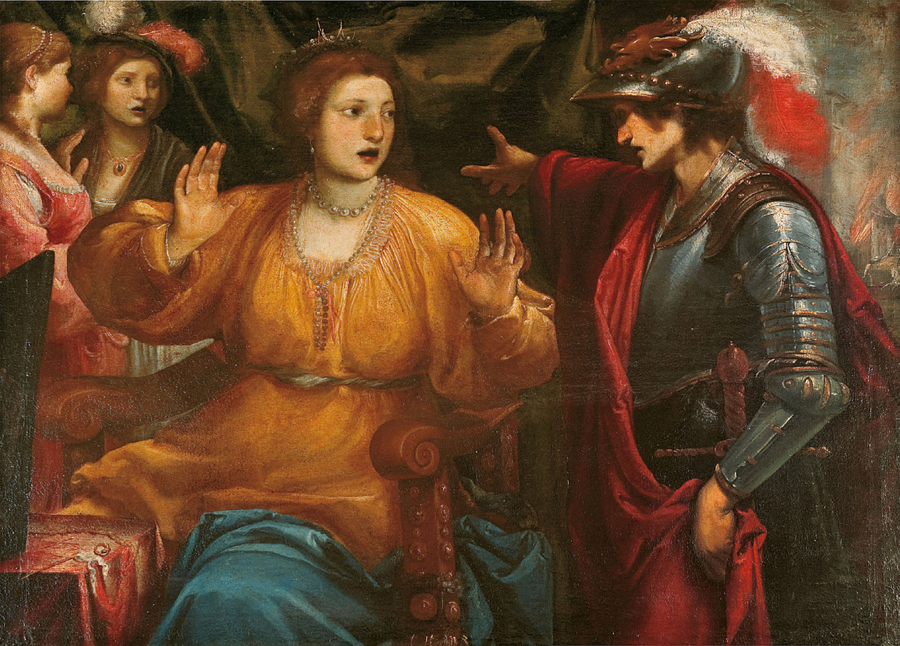 La Regina Semiramide